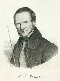 Wilhelm Ferdinand Bendz (20.3.1804-14.11.1832), dansk maler